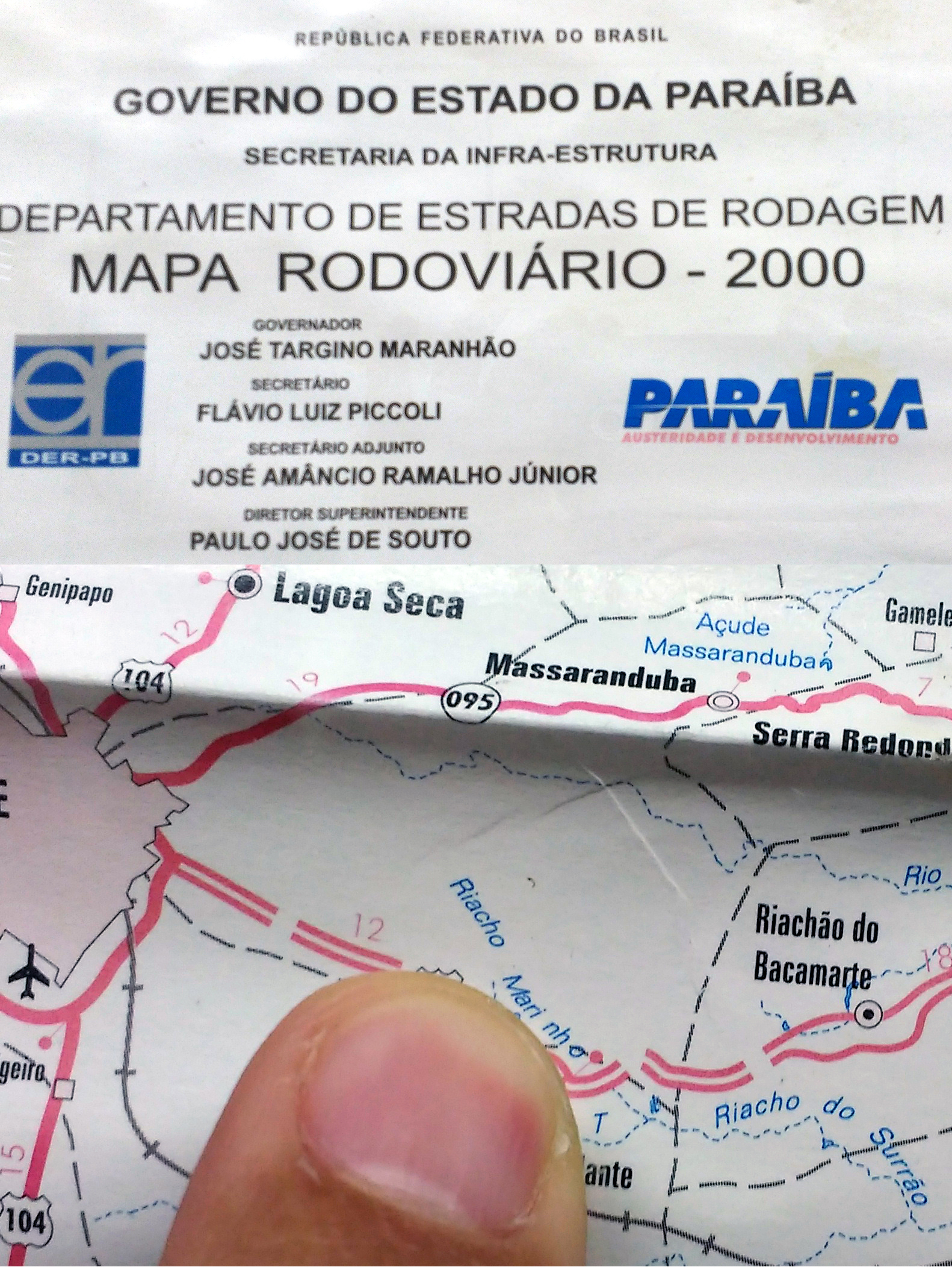 Esta imagem mostra o nome do riacho que sai do bairro Mirante em Campina Grande Paraíba.